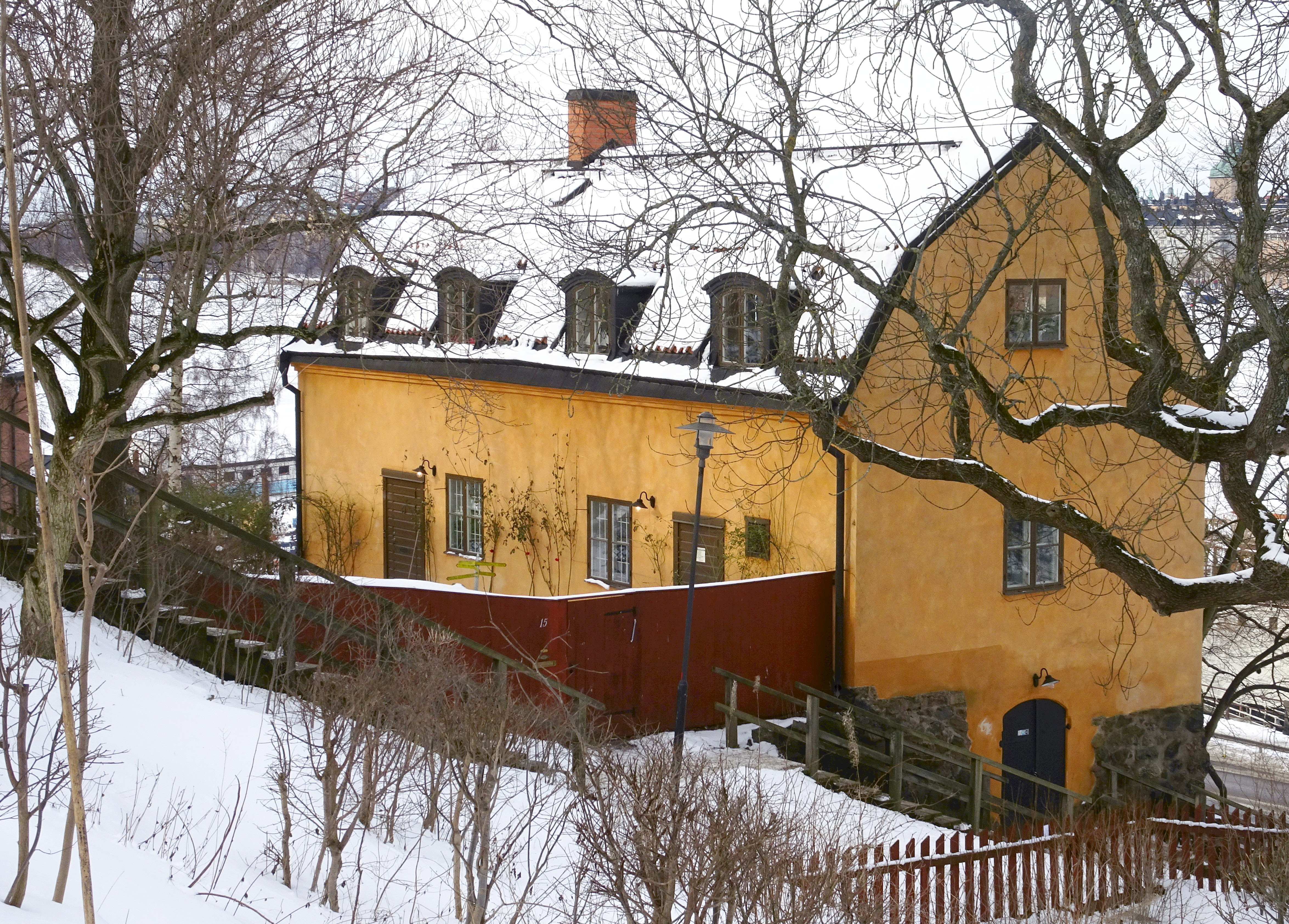 Öbergska gården, f.d. kopparslageriet